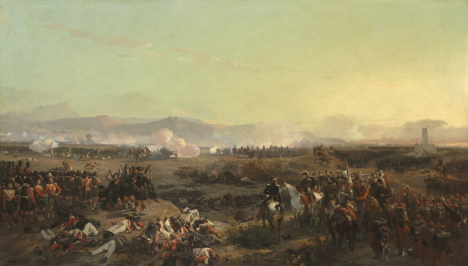 Bataille de l'Alma, 20 septembre 1854. A droite : Français avec représentation possible du maréchal de Saint-Arnaud. A gauche : soldats anglais. Guerre de Crimée (1853-1856). Dimensions : 130 x 227,5 cm. Matière et technique : huile sur toile.